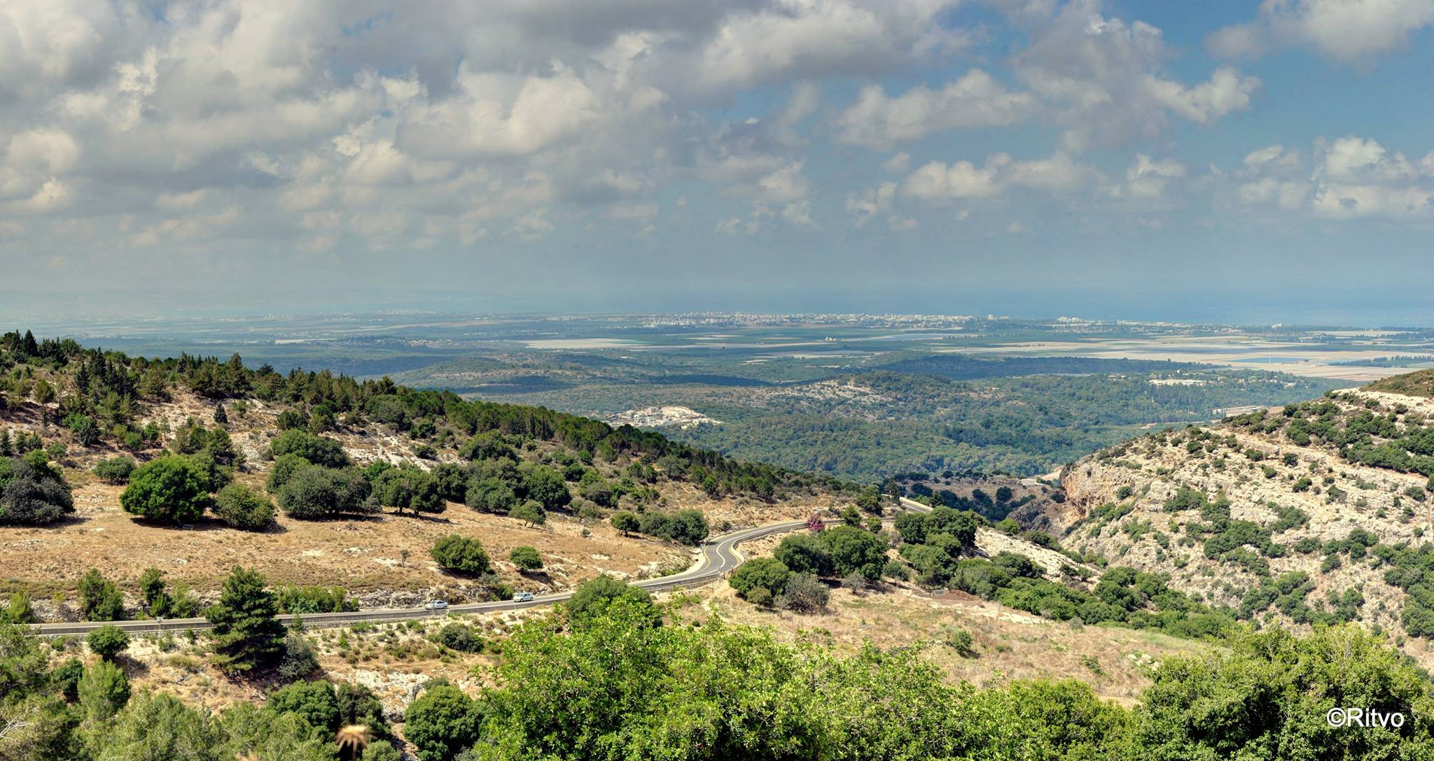 נוף פנורמי הנשקף ממצפה איתן לבב